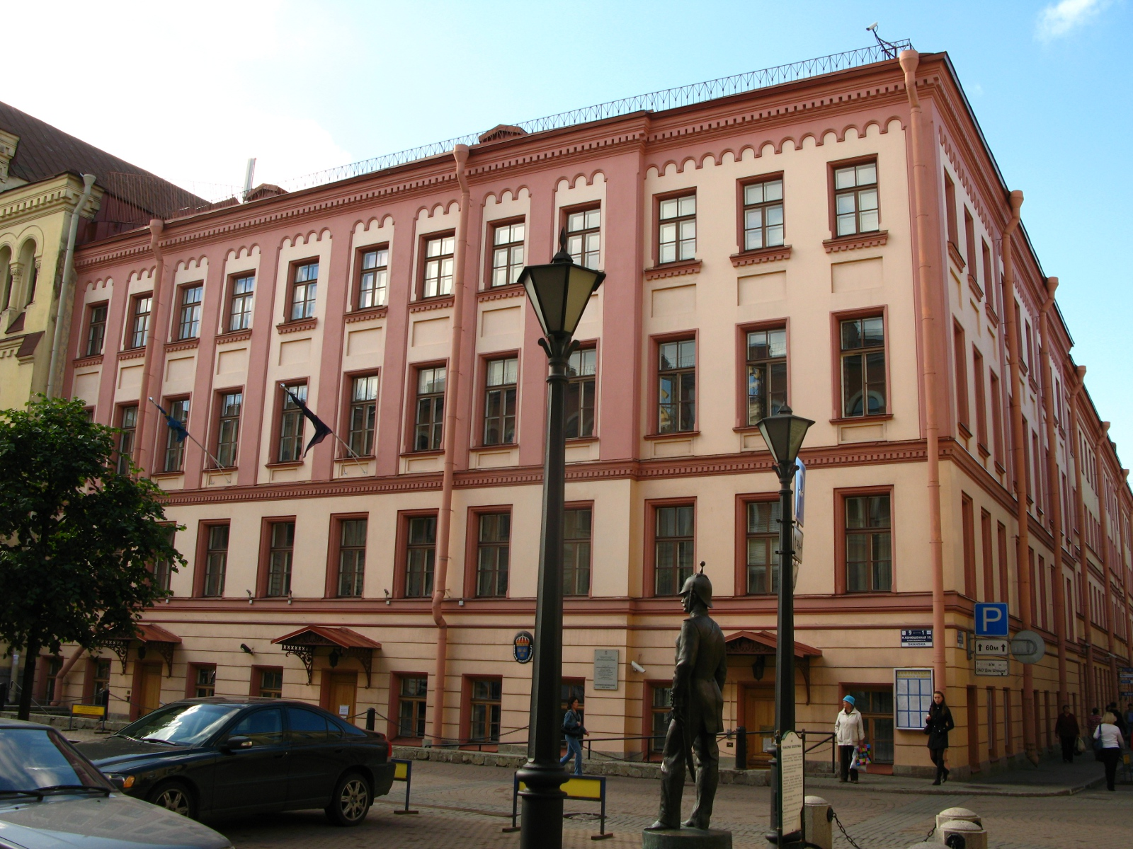 Дом Шведской церкви, вид с Малой Конюшенной